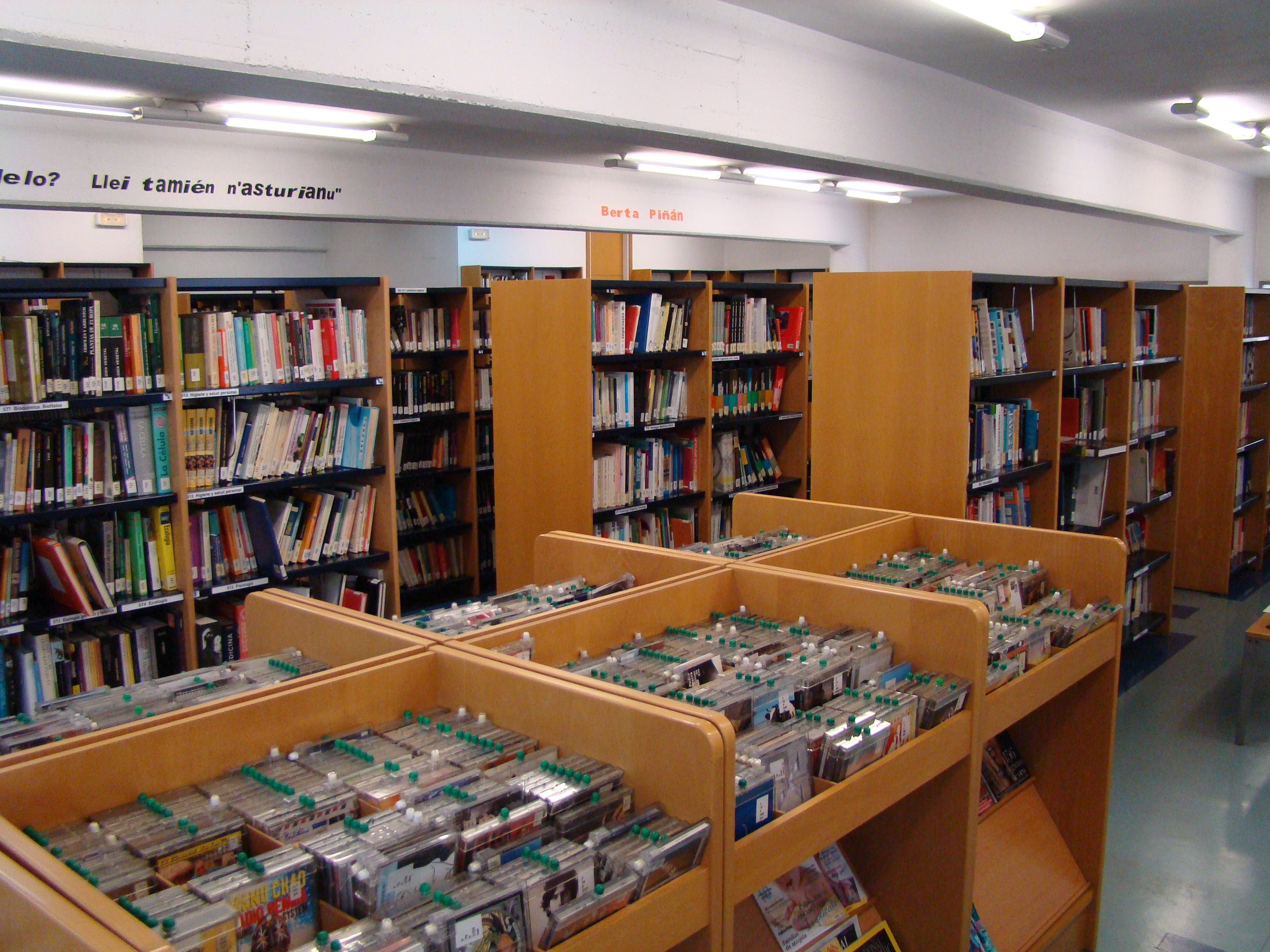 detalle de la sección de adultos de la biblioteca de lugones